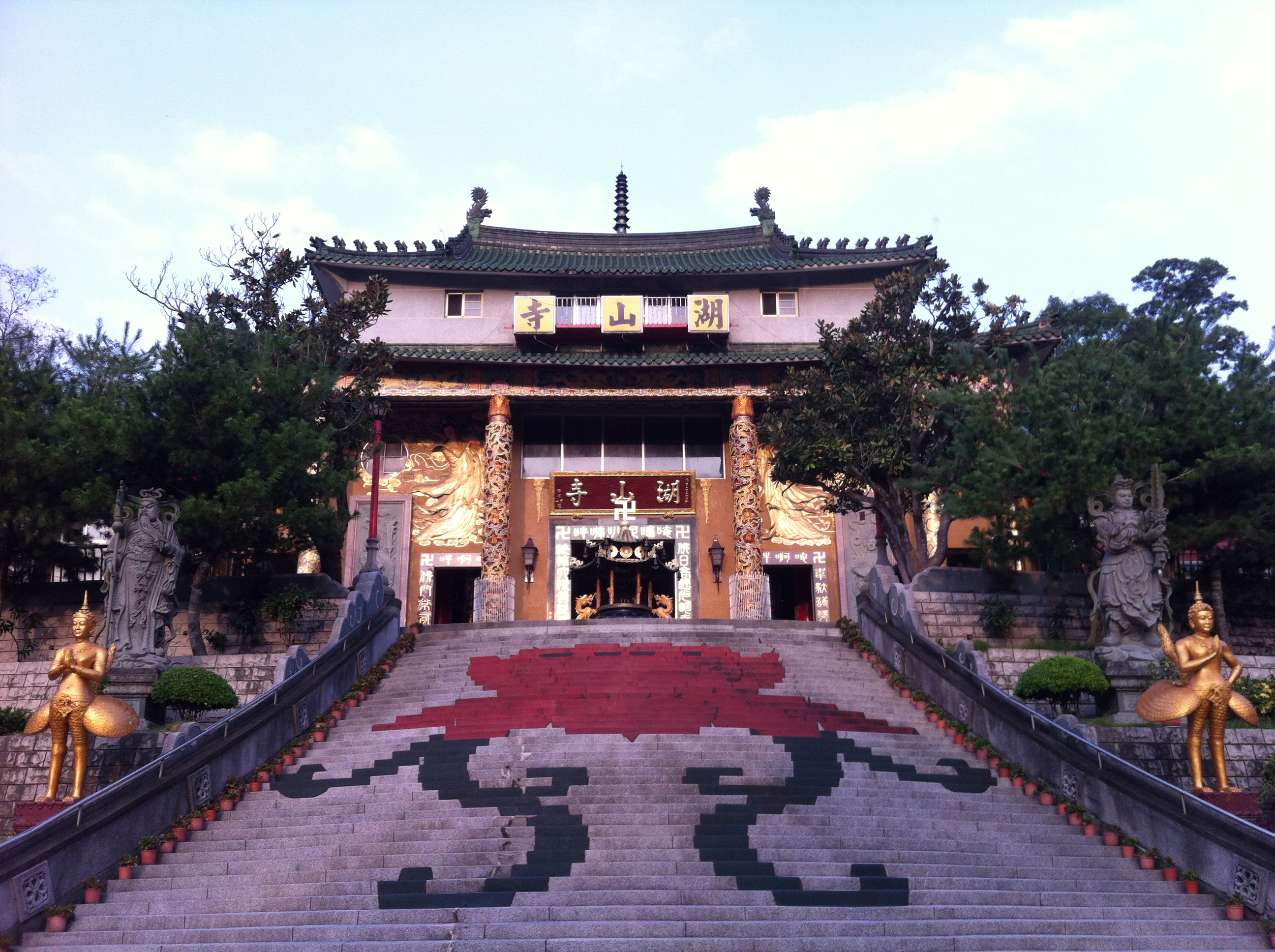 中文（台灣）: 雲林斗六湖山寺正殿